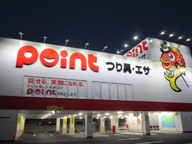 ポイント鹿児島与次郎店